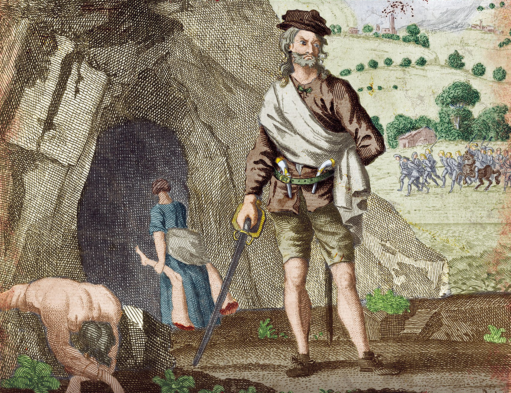 Gravure colorisée représentant Sawney Bean.